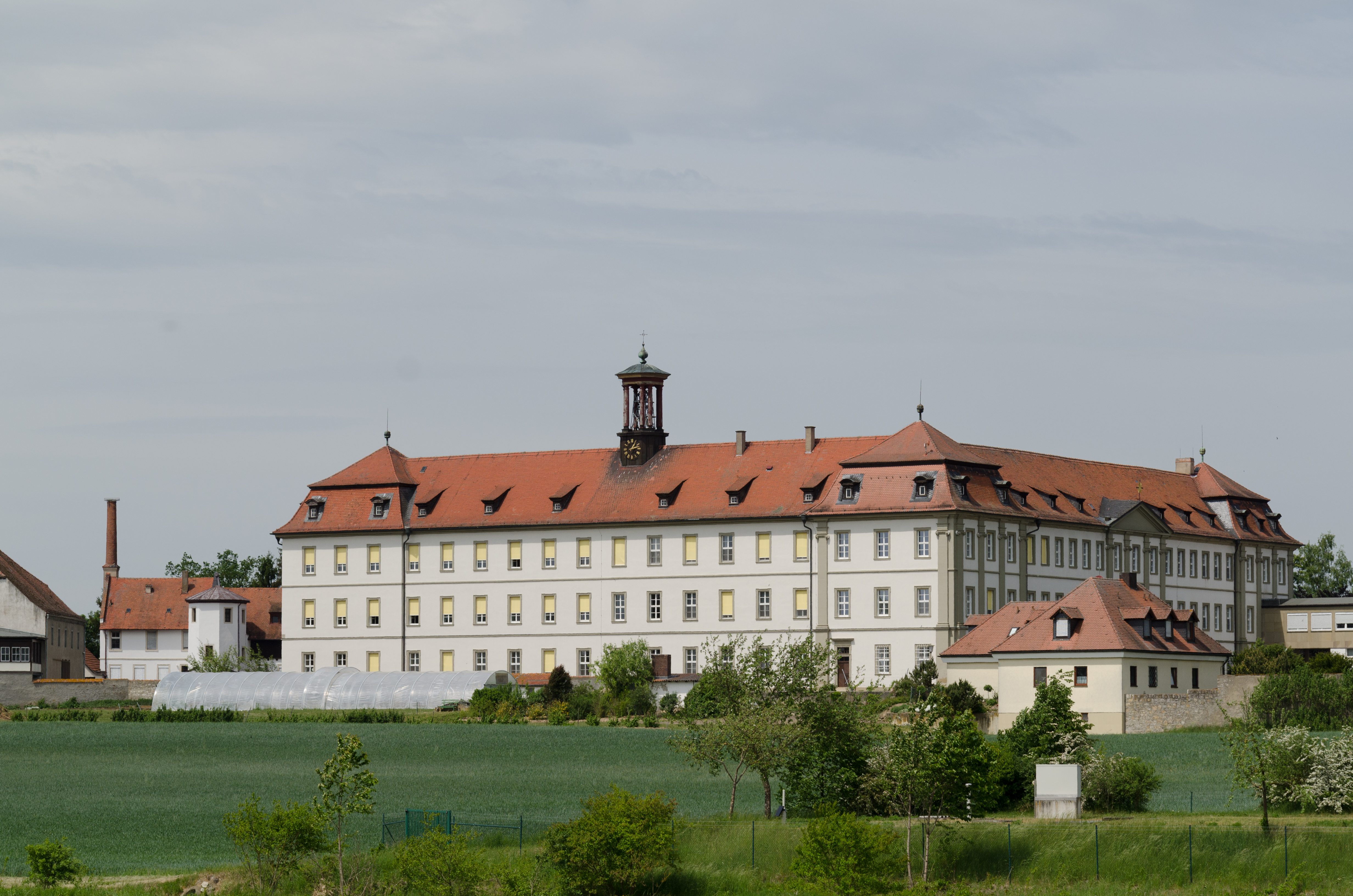 Röthlein, Heidenfeld, Ehem. Augustinerchorherrenstift